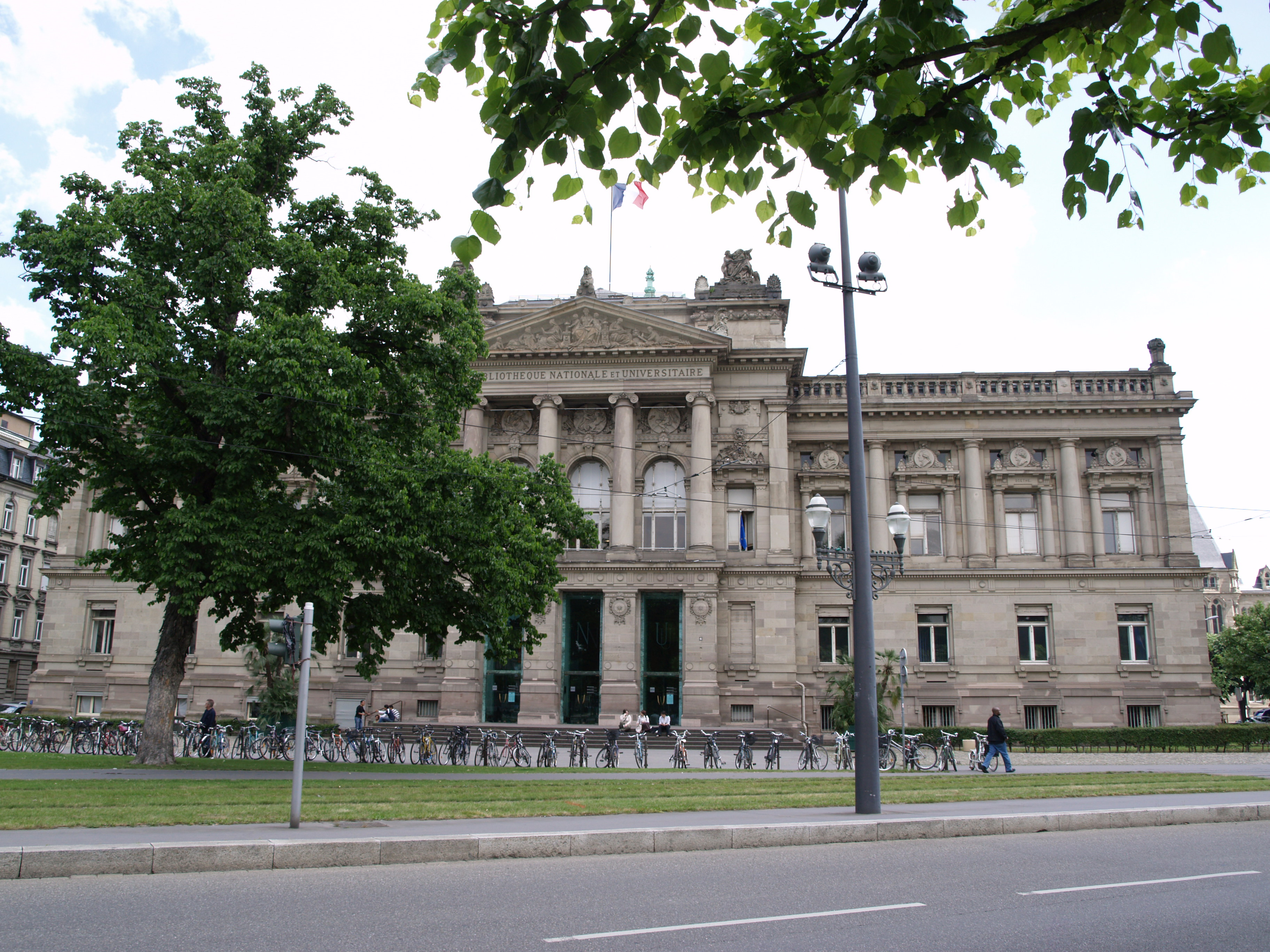 La bibliothèque nationale et universitaire de Strasbourg